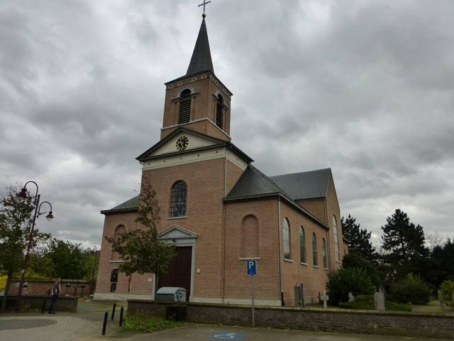 Langdorp Wolfsdonk-Dorp Sint-Antoniuskerk